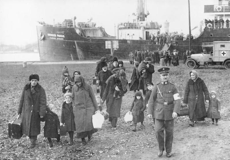 Die Not der Wolgadeutschen. Ankunft des ersten Seetransportes deutsch-russischer Bauernflüchtlinge in Swinemünde- Osternothafen am 2.12.1929. 31242) Truppenweise verlassen die von ihrer Scholle Vertriebenen mit ihrer geringen Habe den Transportdampfer "Rykow" unter der Obhut des Roten Kreuzes.